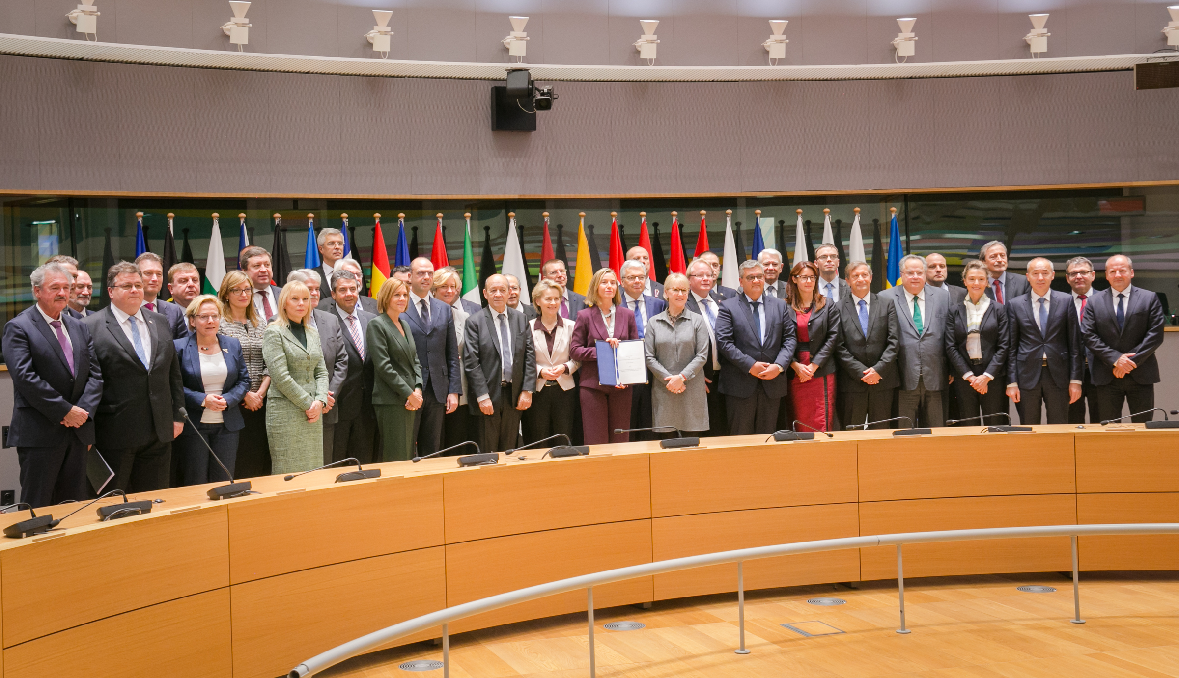 Photo: Tauno Tõhk (EU2017EE)